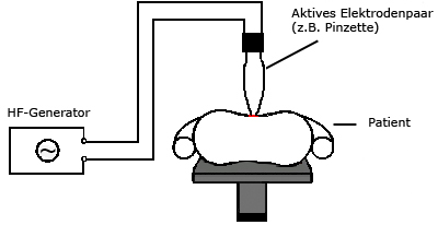 Monopolare Anwendungstechnik in der HF-Chirurgie